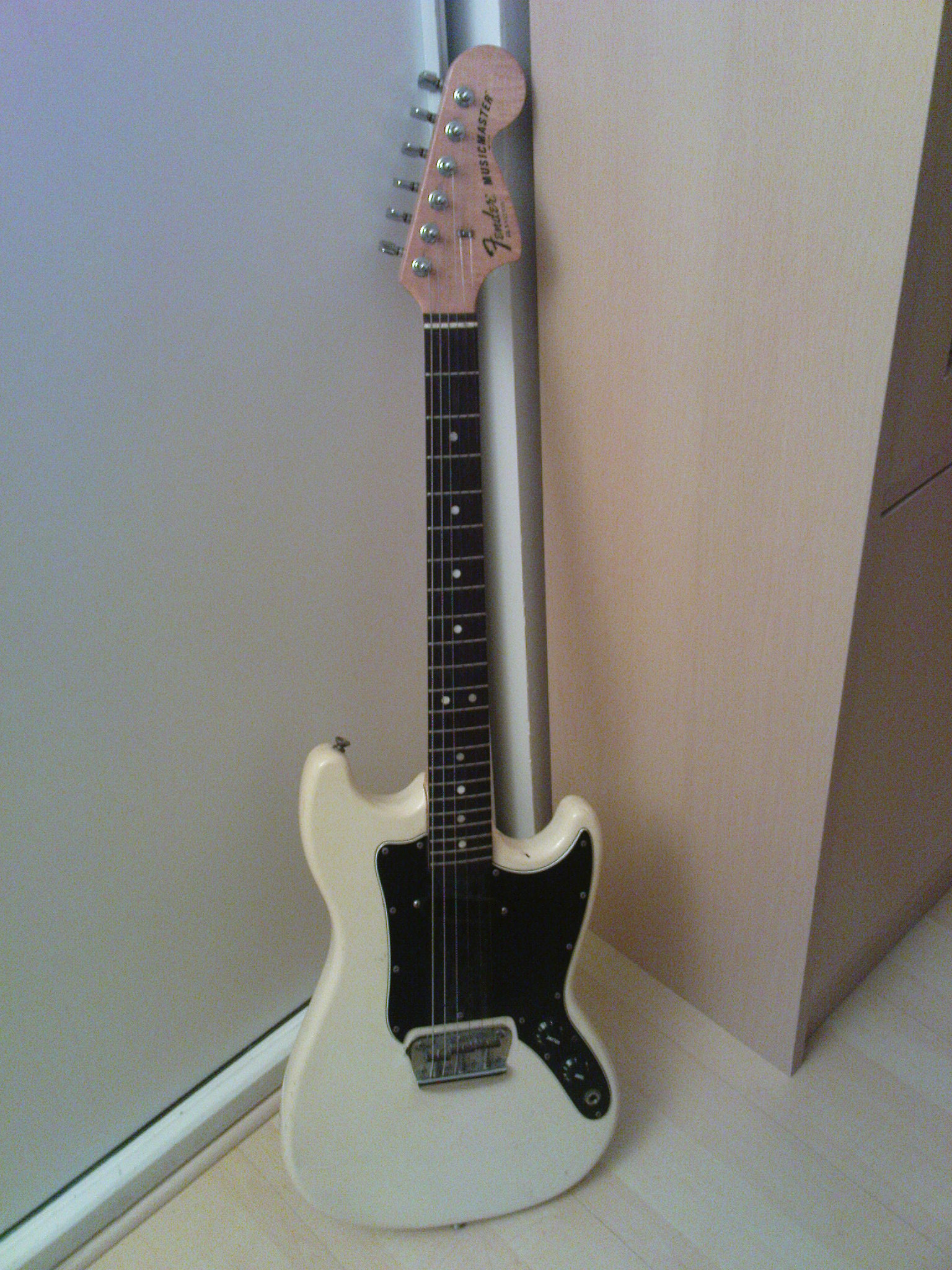 Fender Musicmaster de 1978